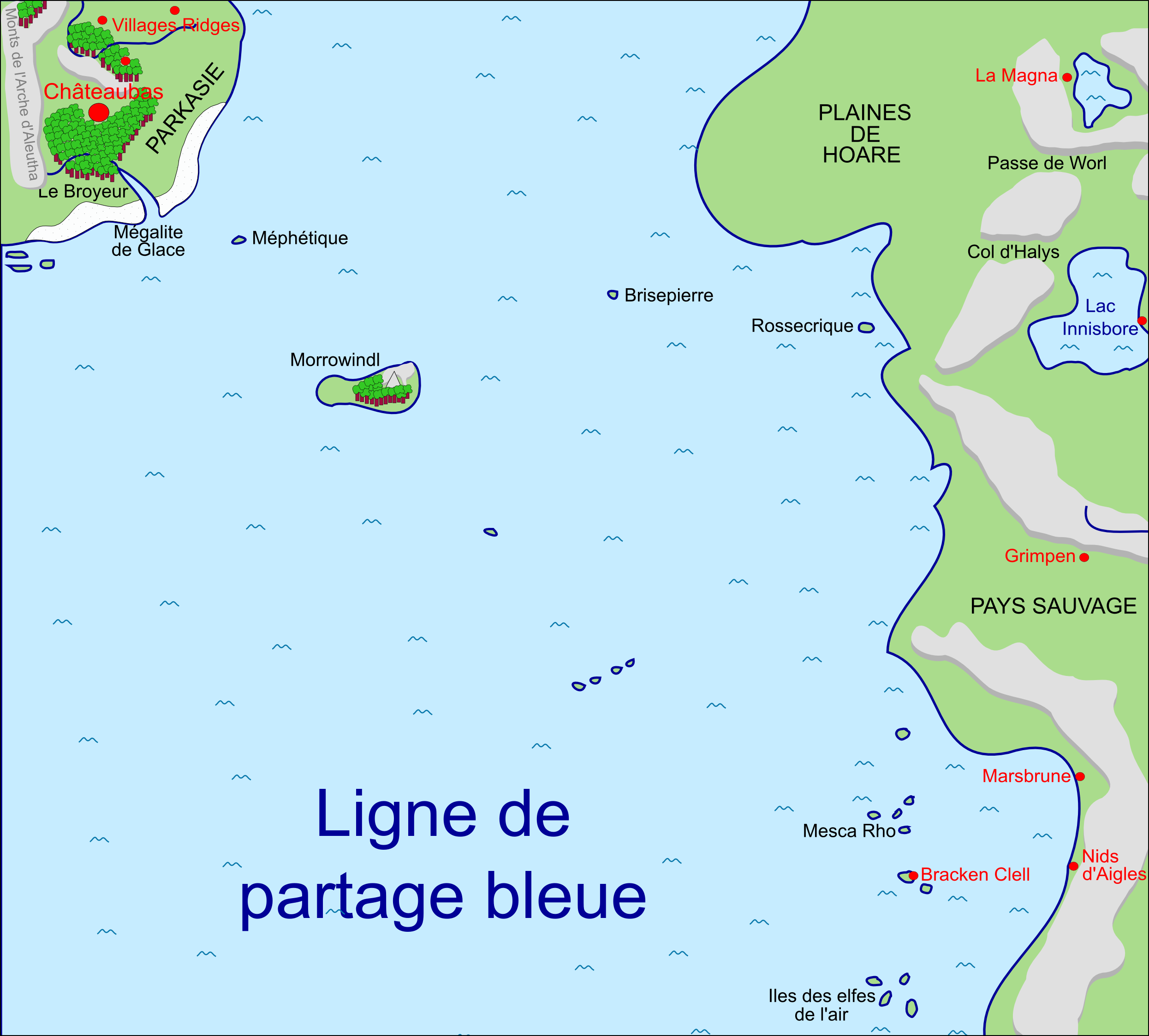 Outremer dans Shannara